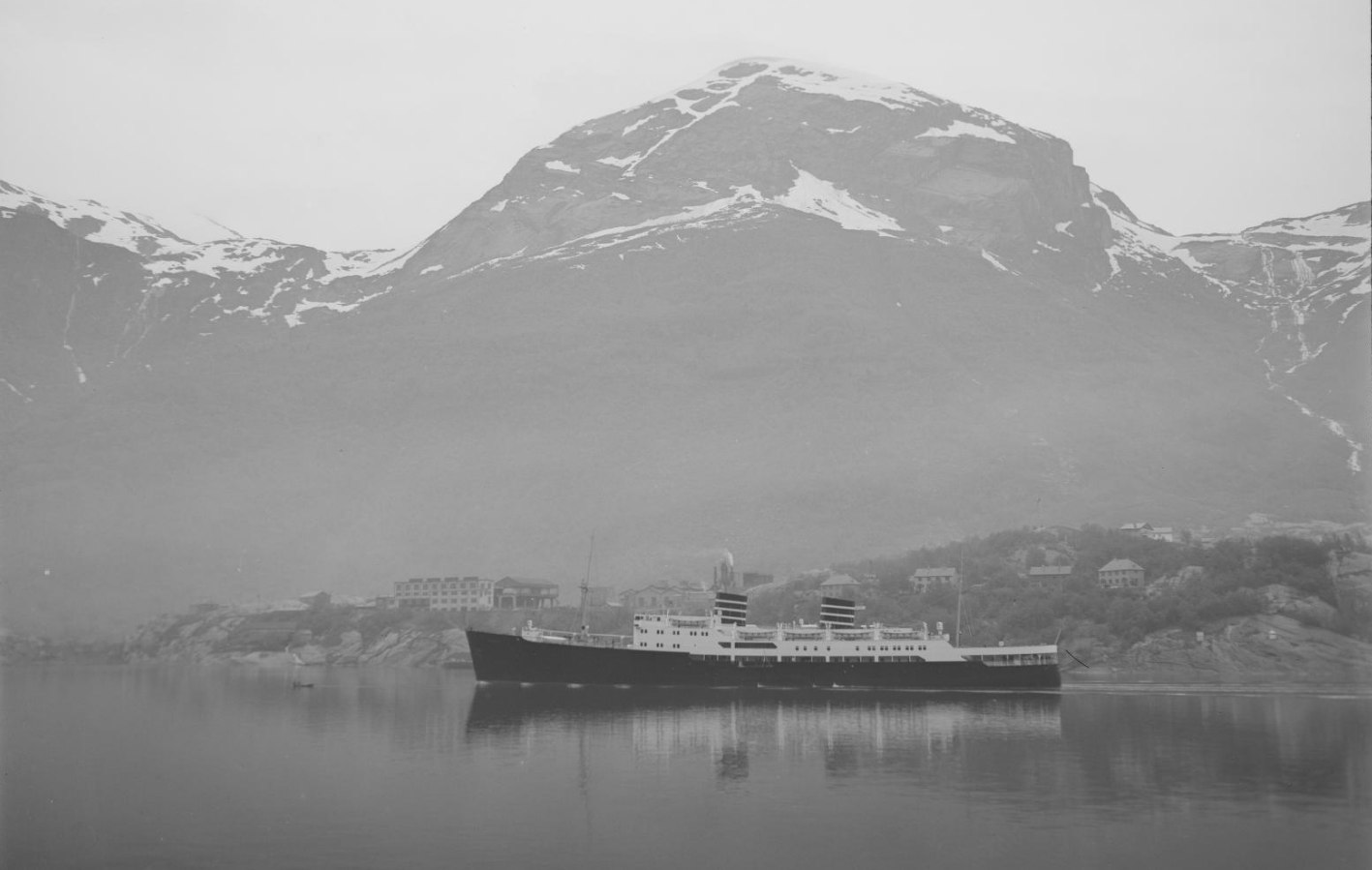 Bildet er hentet fra Nasjonalbibliotekets bildesamling. Anmerkninger til bildet var: "Venus" Sørfjorden, Odda